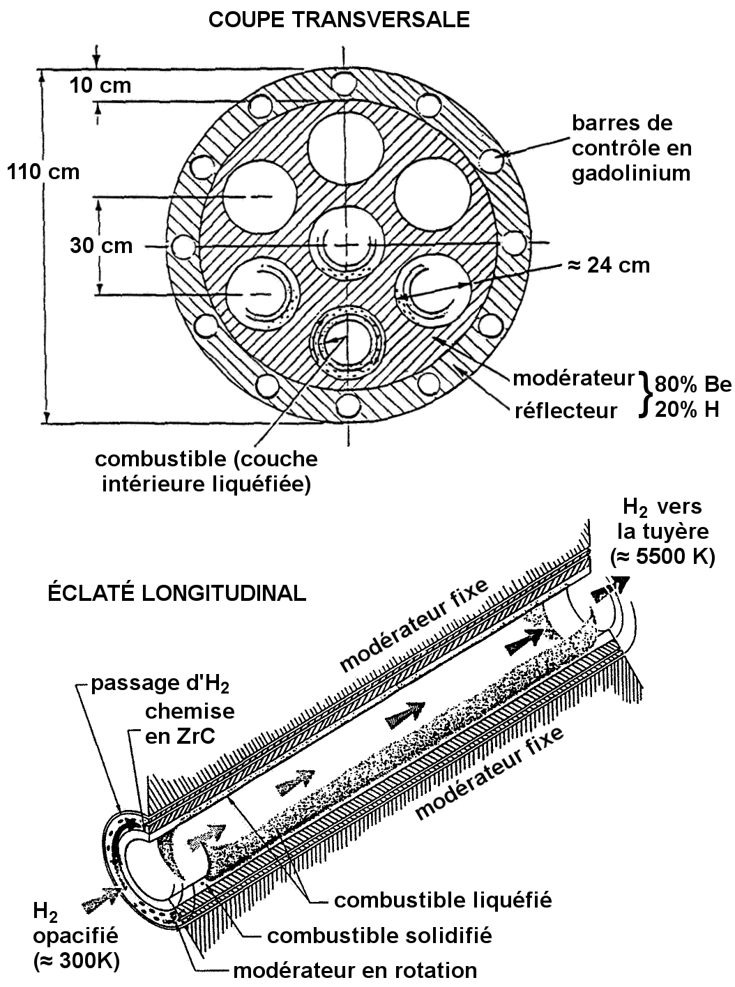 Liquid Annular Reactor System diagram